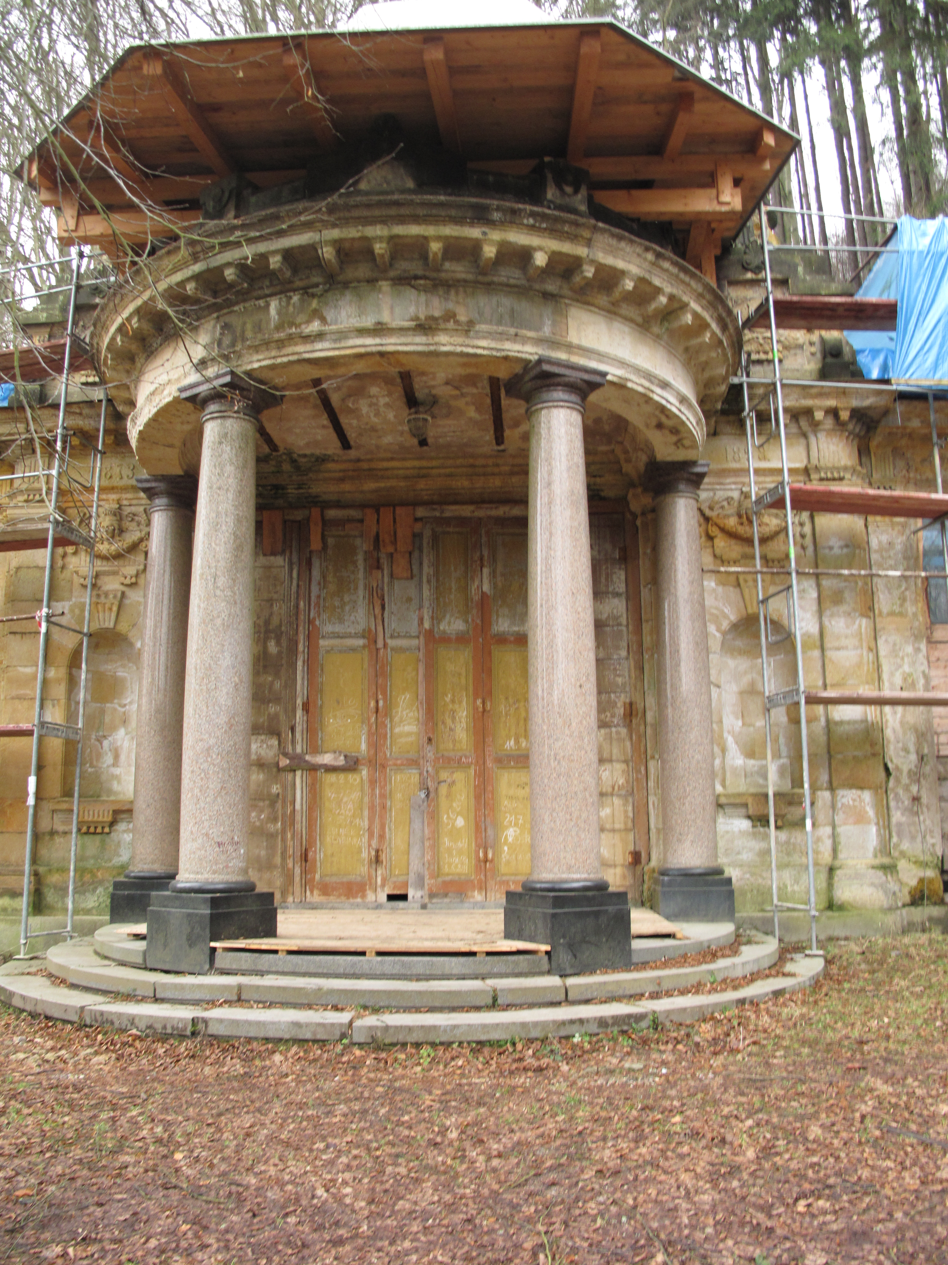 Kyselka. Okres Karlovy Vary, Česká republika.